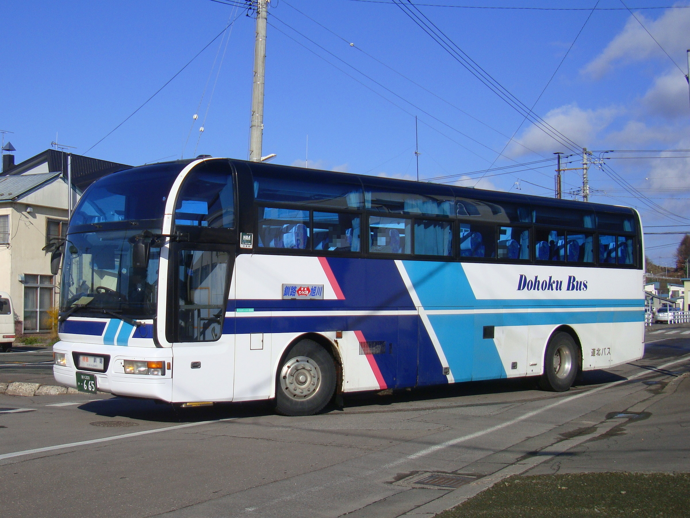 "Sunlise Asahikawa Kushiro gō" Asahikawa to Kushuro